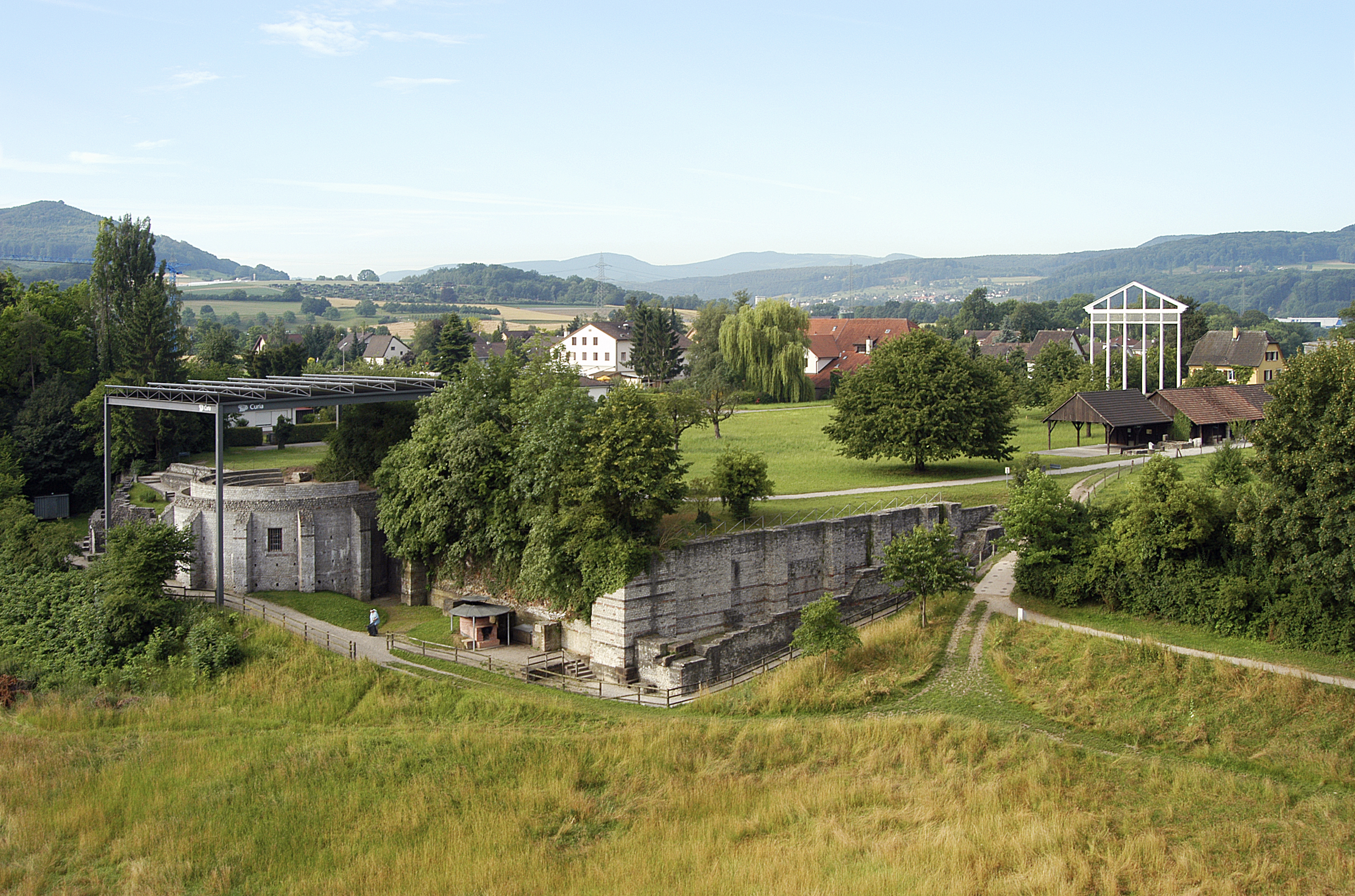 Das Forum mit der Curia von Norden her betrachtet